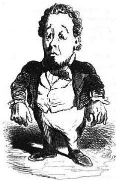 Caricature de Ducoux, préfet de police en 1848, par Cham.